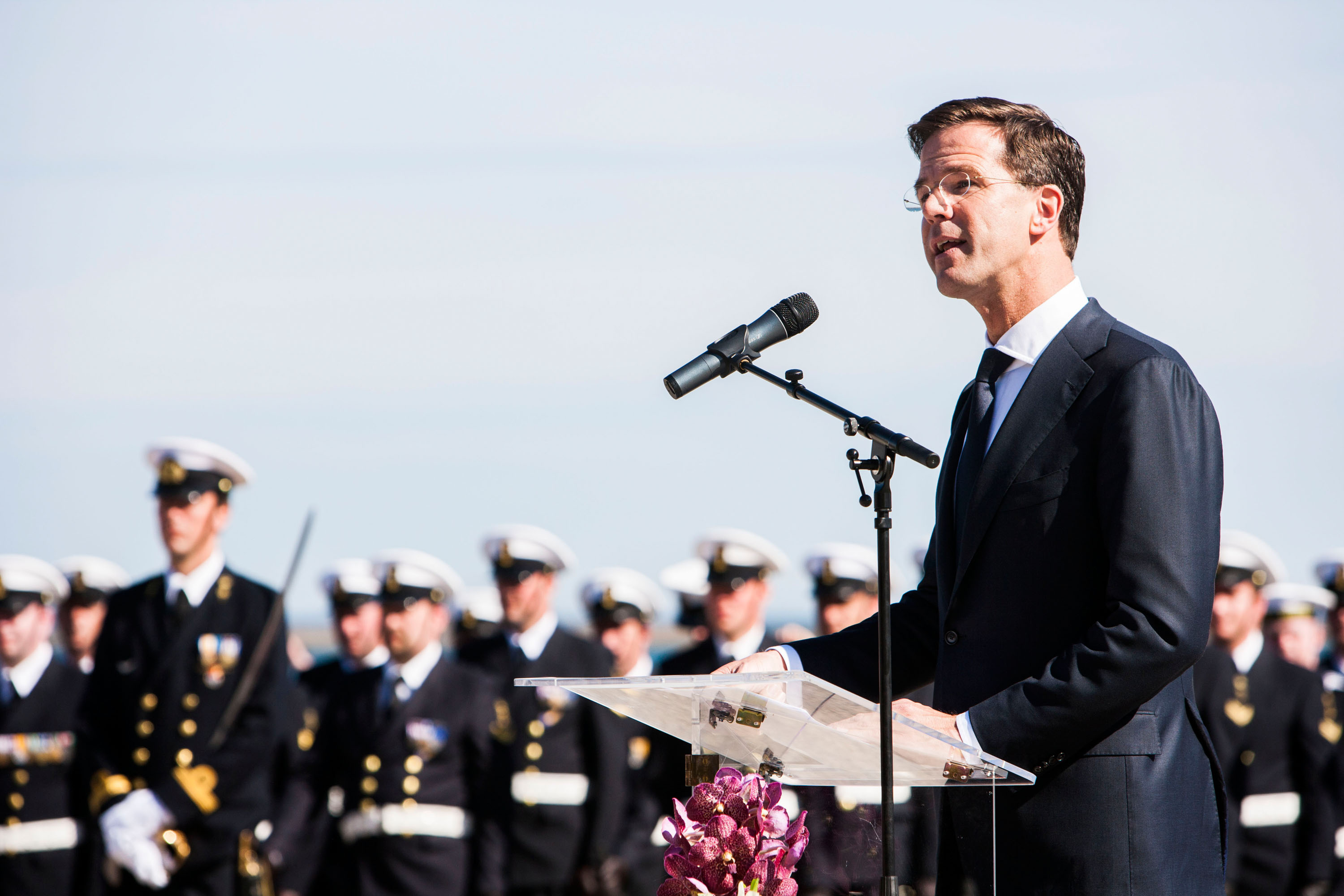 ‘Velen brachten het hoogste offer voor onze vrijheid. Vandaag bewijzen wij de eer aan hen’ –Minister-president Rutte bij de Nederlands-Franse herdenking in Arromanches, Normandie. Vandaag wordt herdacht dat 70 jaar geleden de geallieerden voet aan land zetten in Normandië, waarmee de bevrijding van Europa en het eind van de Tweede Wereldoorlog in zicht kwam. ‘De compromisloze keuze voor herstel van vrijheid en menselijke waardigheid die toen werd gemaakt, moet ook de onze zijn. Steeds weer. Elke dag opnieuw’, zo sloot de premier af. In Arromanches werden in augustus 1944 de militairen van de Nederlandse Koninklijke Brigade ‘’Prinses Irene” aan wal gezet. Zestien veteranen van de Prinses Irene Brigade waren bij de herdenking aanwezig. De minister-president legde, evenals het Koninklijk paar, een krans voor de gevallenen en sprak met enkele aanwezige veteranen. Volledige speech terug te lezen via is.gd/j5NIwy. Foto: Dave de Vaal.